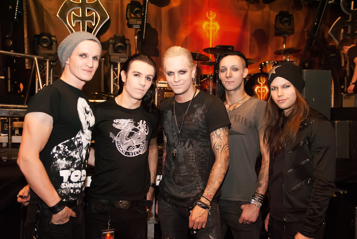 Bandfoto von Lord of the Lost (aufgenommen am 12.10.2012 in Hannover)